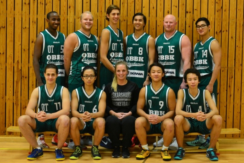 Lagfoto på herrlaget säsongen 2015/16